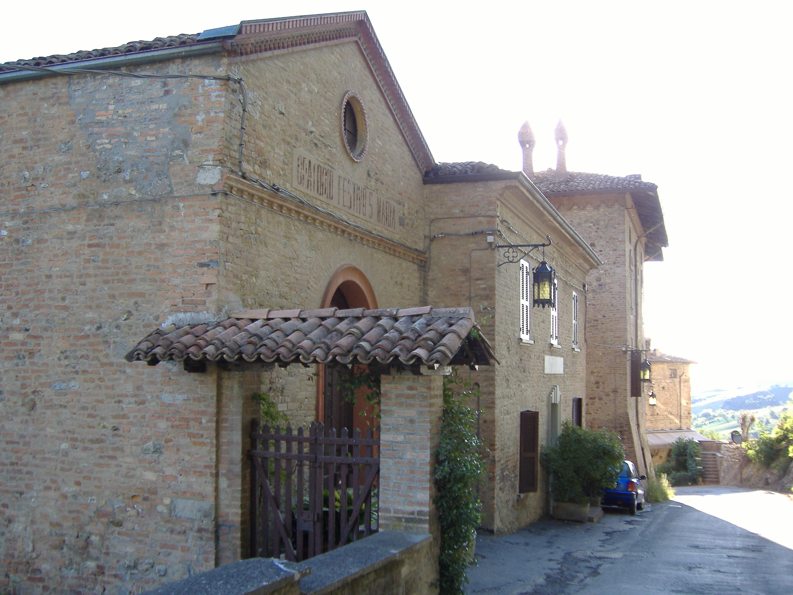 Old oratorio, Tabiano Castello